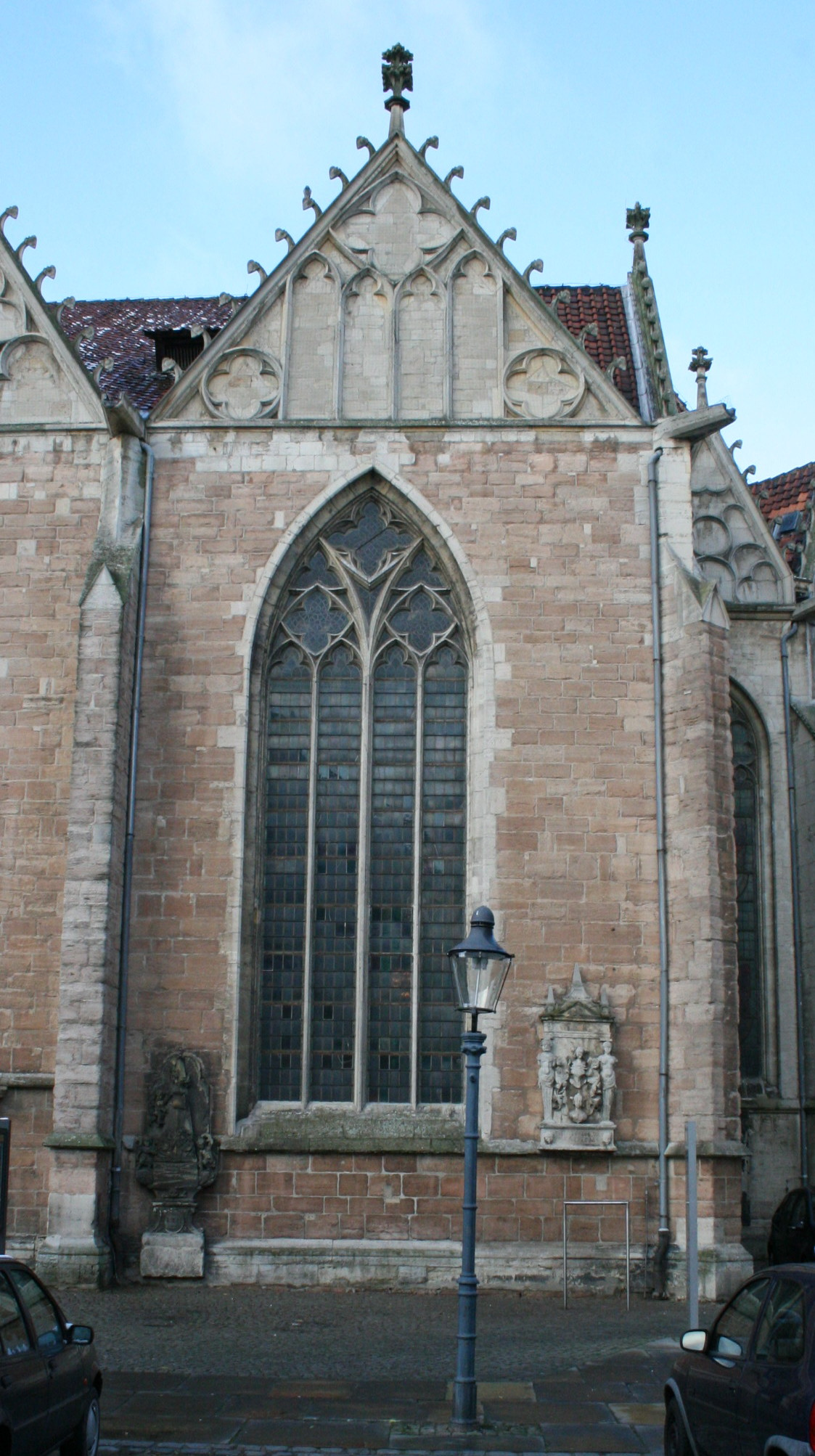 Rogenstein an der südöstlichen Fassade der Martinikirche in Braunschweig